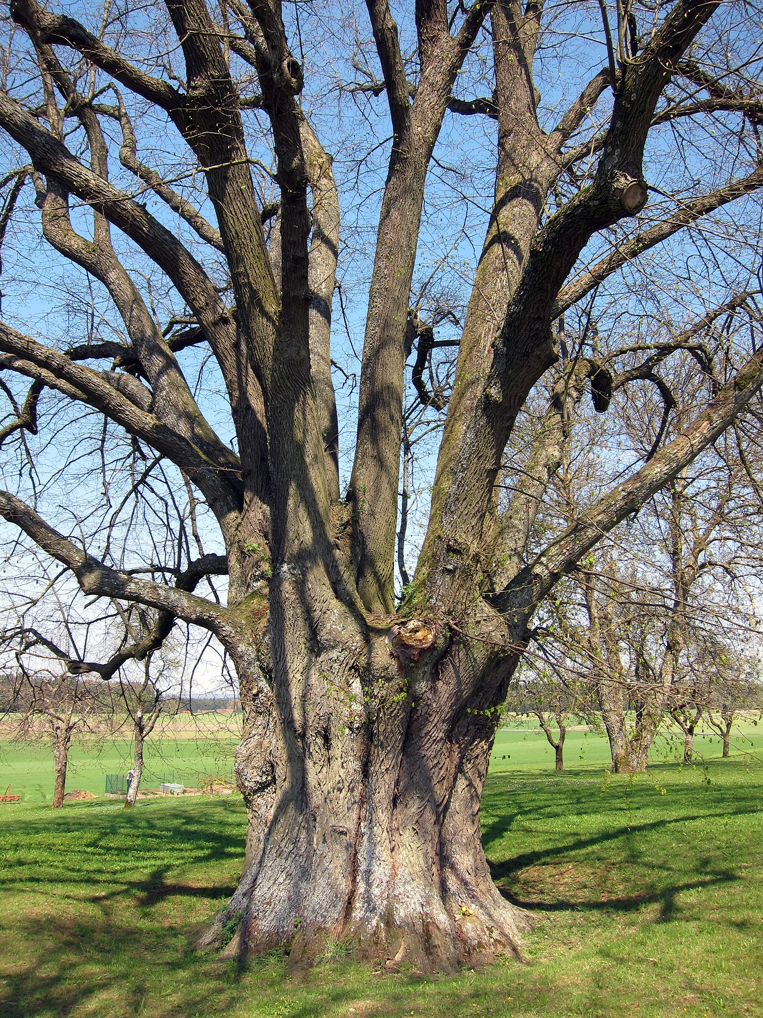 Russenlinde